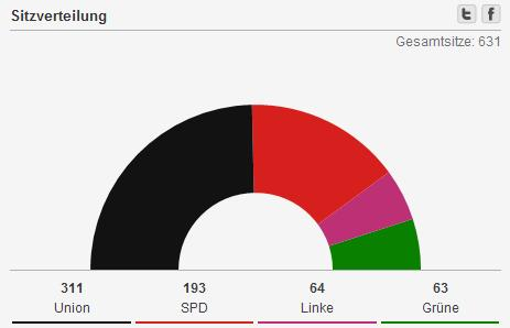 한국어 (조선): 2013년 독일연방연합 선거의 의석수입니다.